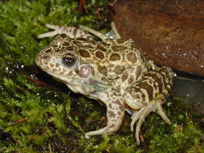 Rana areolata